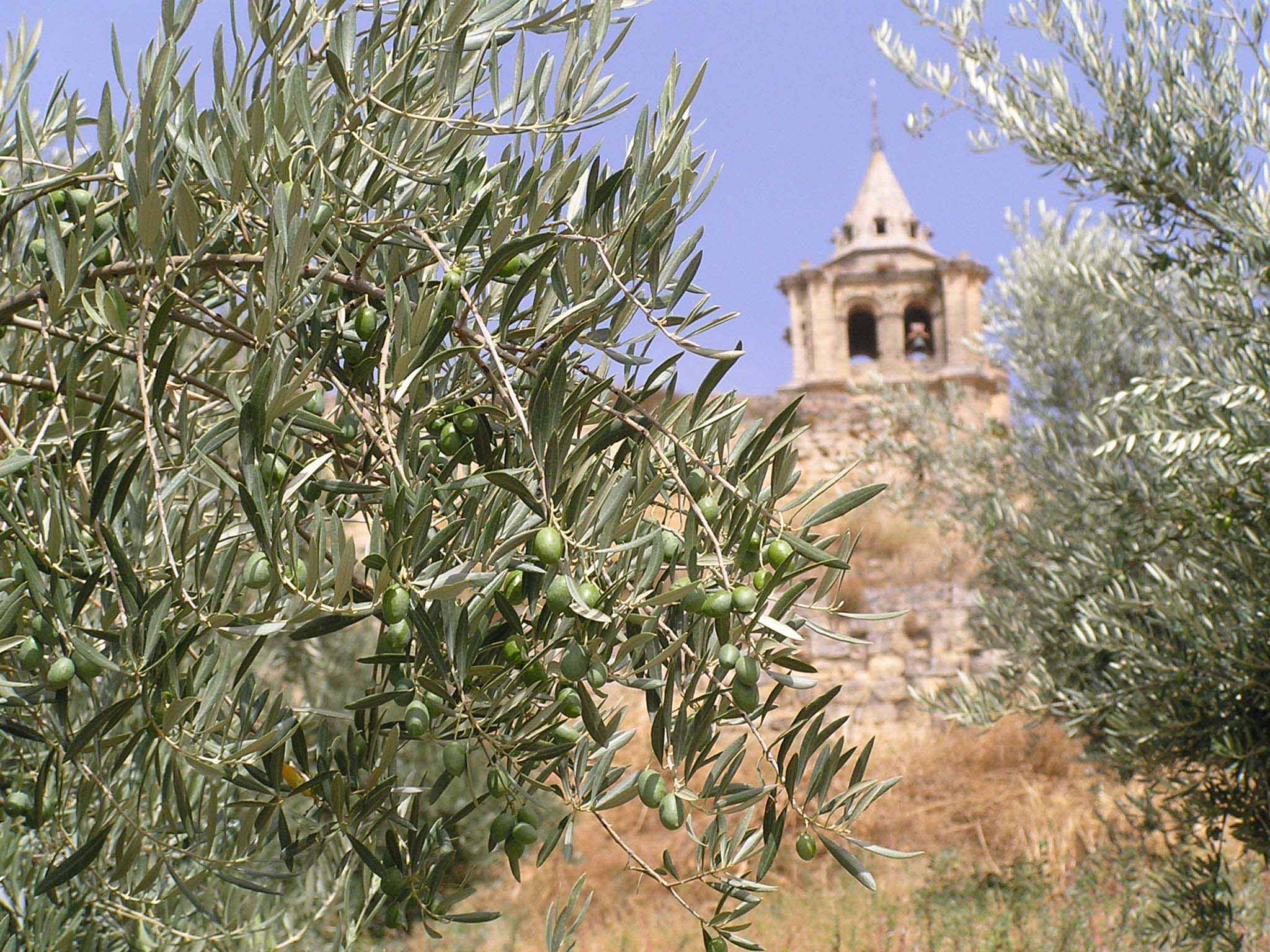 Olivo con su fruto aún verde en Alcalá la Real (Jaén, España).